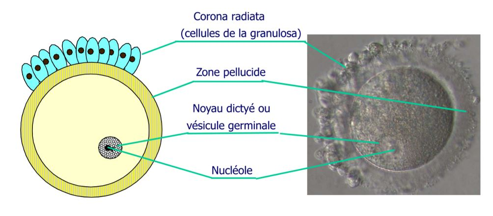 Ovocyte